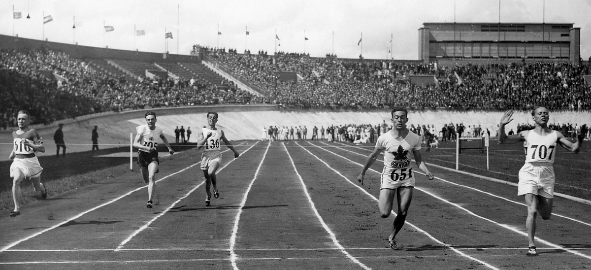 Olympische Spelen 1928 Amsterdam, Nederland : Tijdens de eerste serie van de 100 meter hardlopen wint de Canadees Fitzpatrick voor de Duitser Corts. Tweede van links de Nederlander Hennings (nr.305).